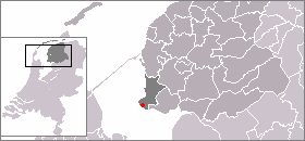 Kaart met de locatie van Skarl (Scharl), gemaakt uit sjabloon van Wikipedia-gebruiker Mtcv